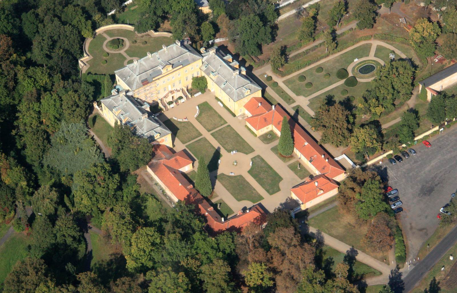 Krásný dvůr letecky